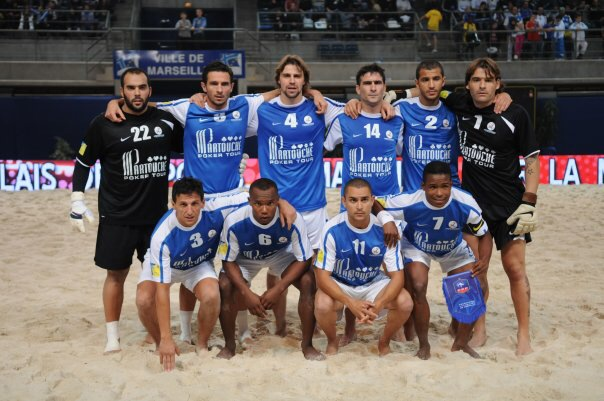 22 Belamri, 8 François, 4 Devaux, 14 Sciortino, 2 ?, 1 Maté, 3 Ottavy, 6 ?, 11 ?, 7 Basquaise